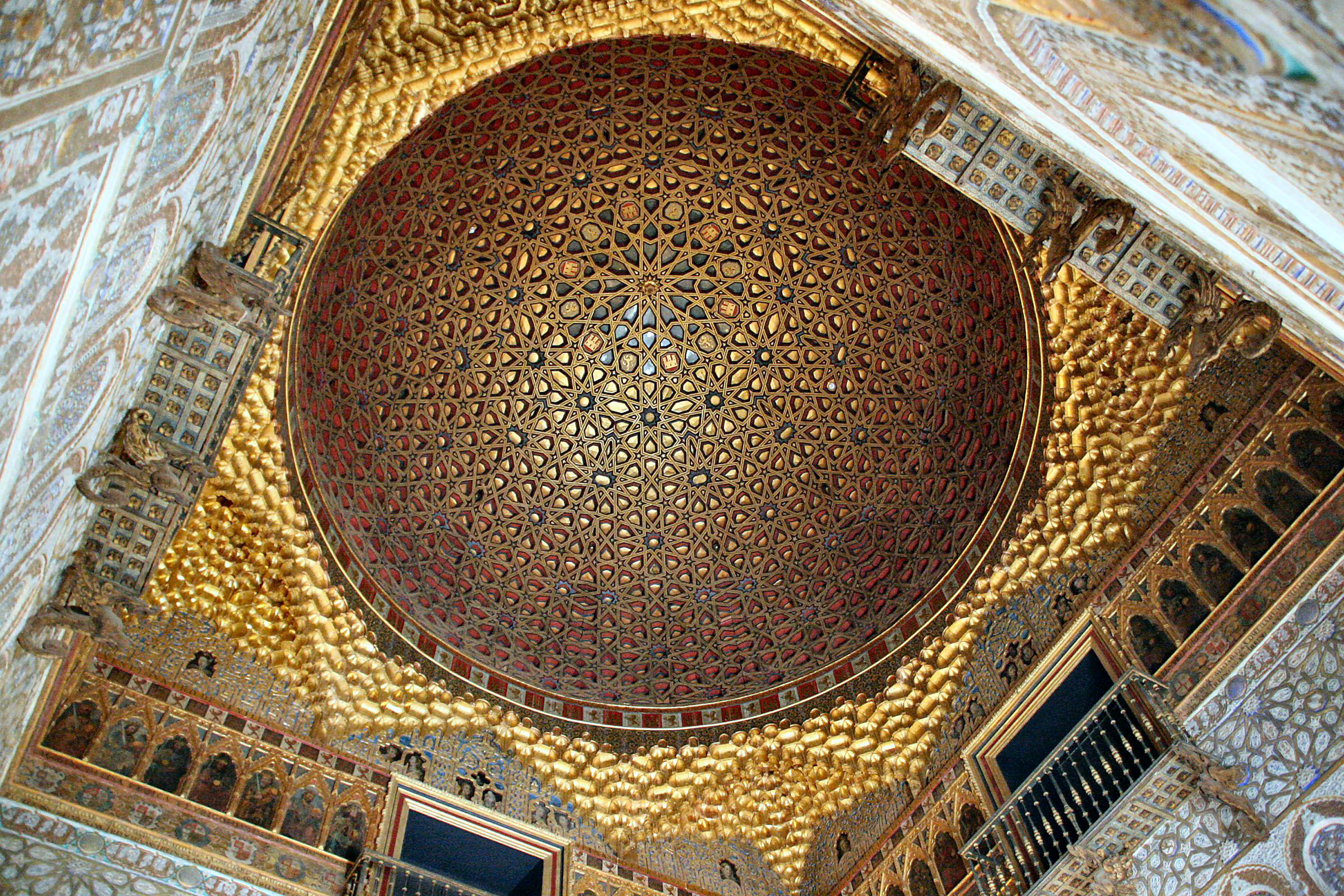 Techo del Salón de Embajadores de los Reales Alcázares de Sevilla